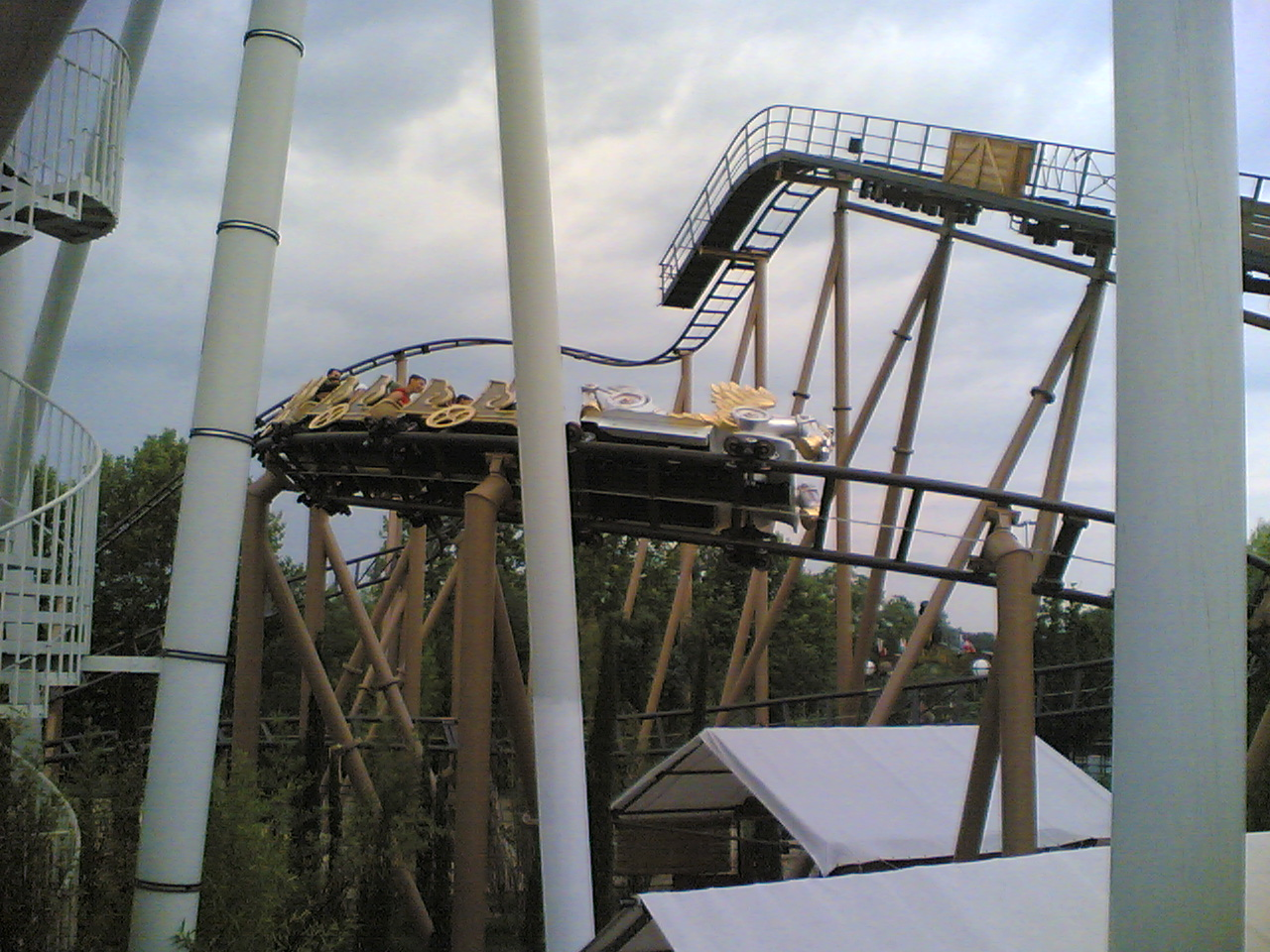 Pegasus (Europapark)